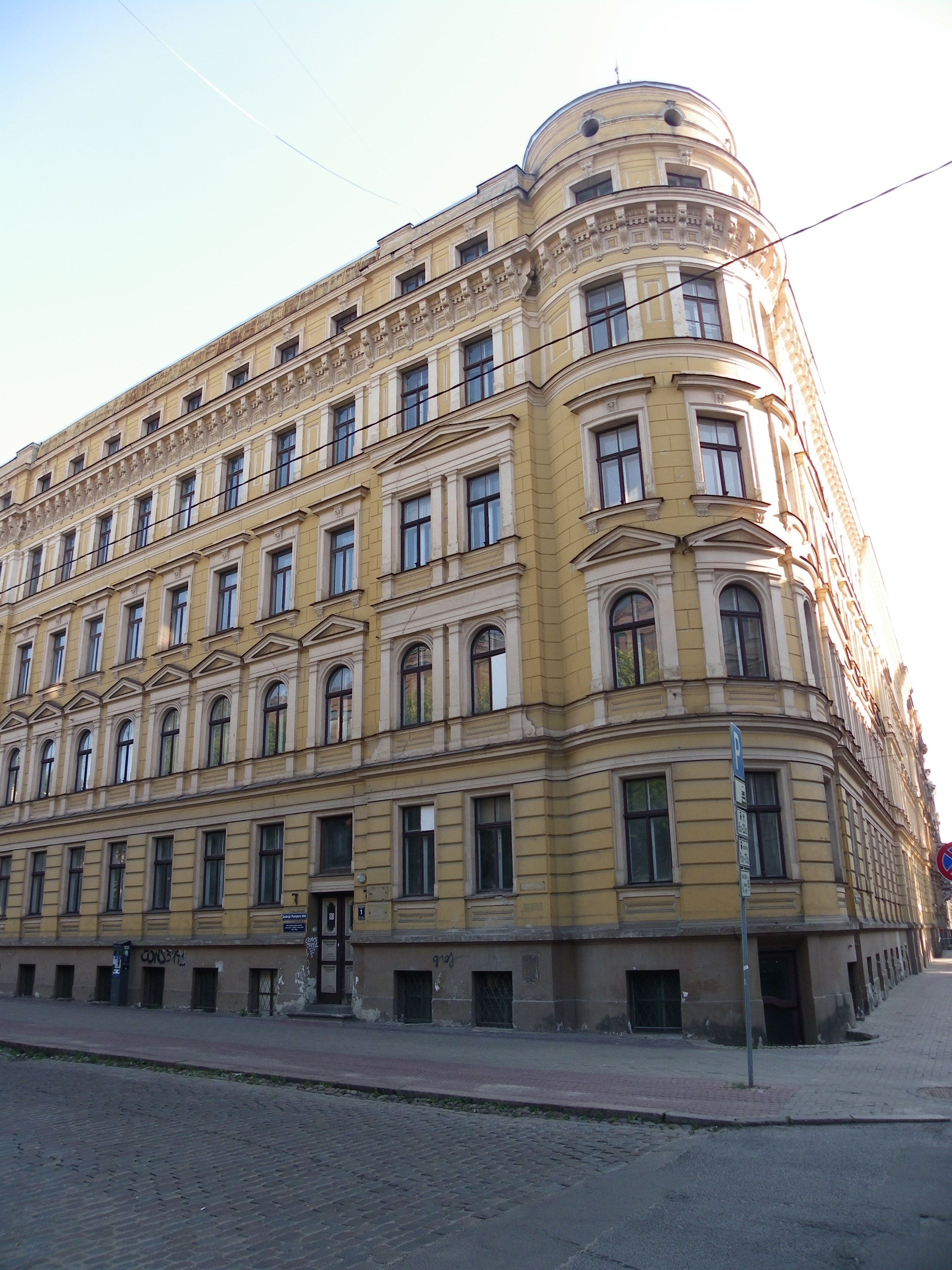 Rīga, Andreja Pumpura iela 1